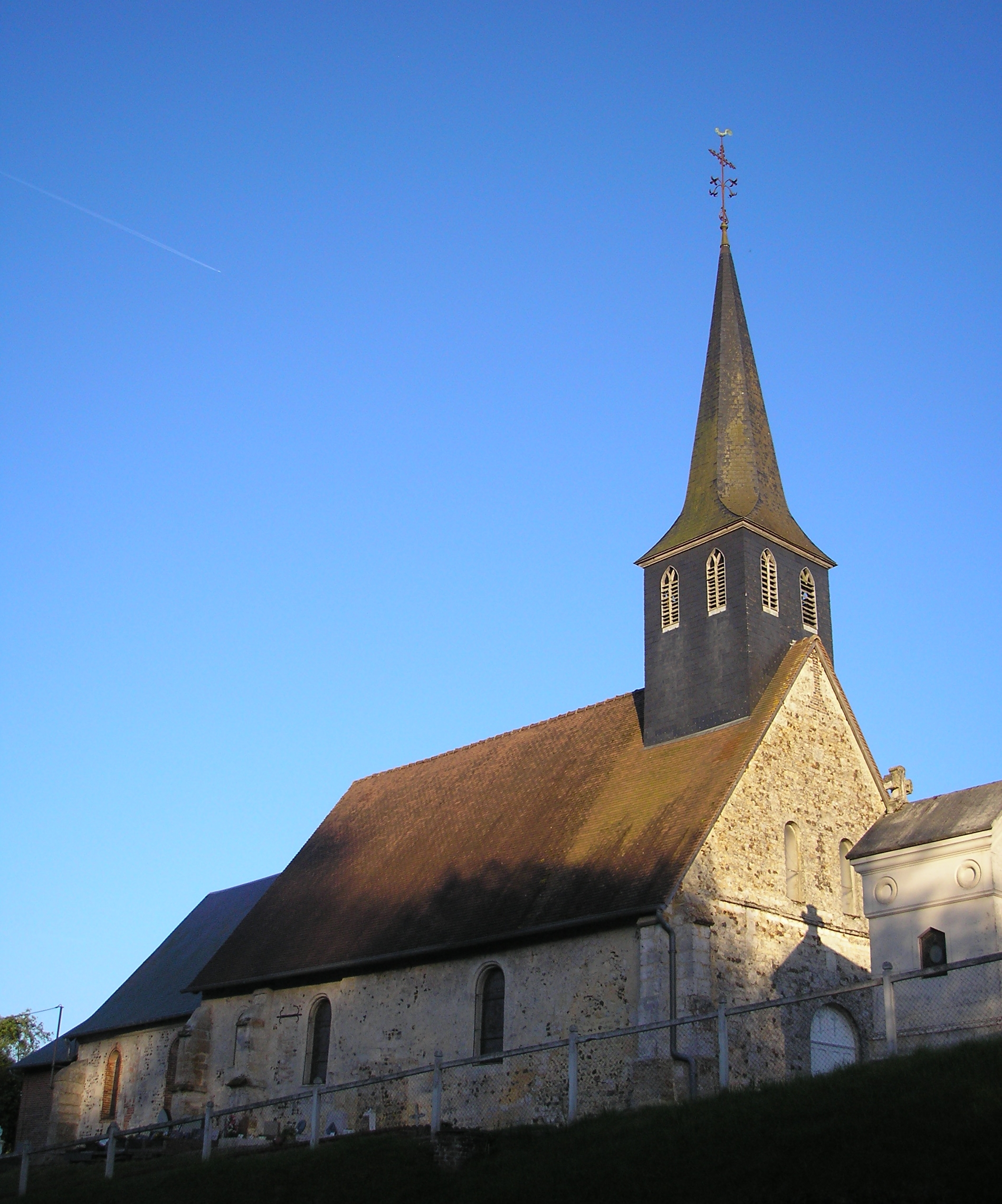 Pontchardon (Normandie, France). L'église Saint-Martin.